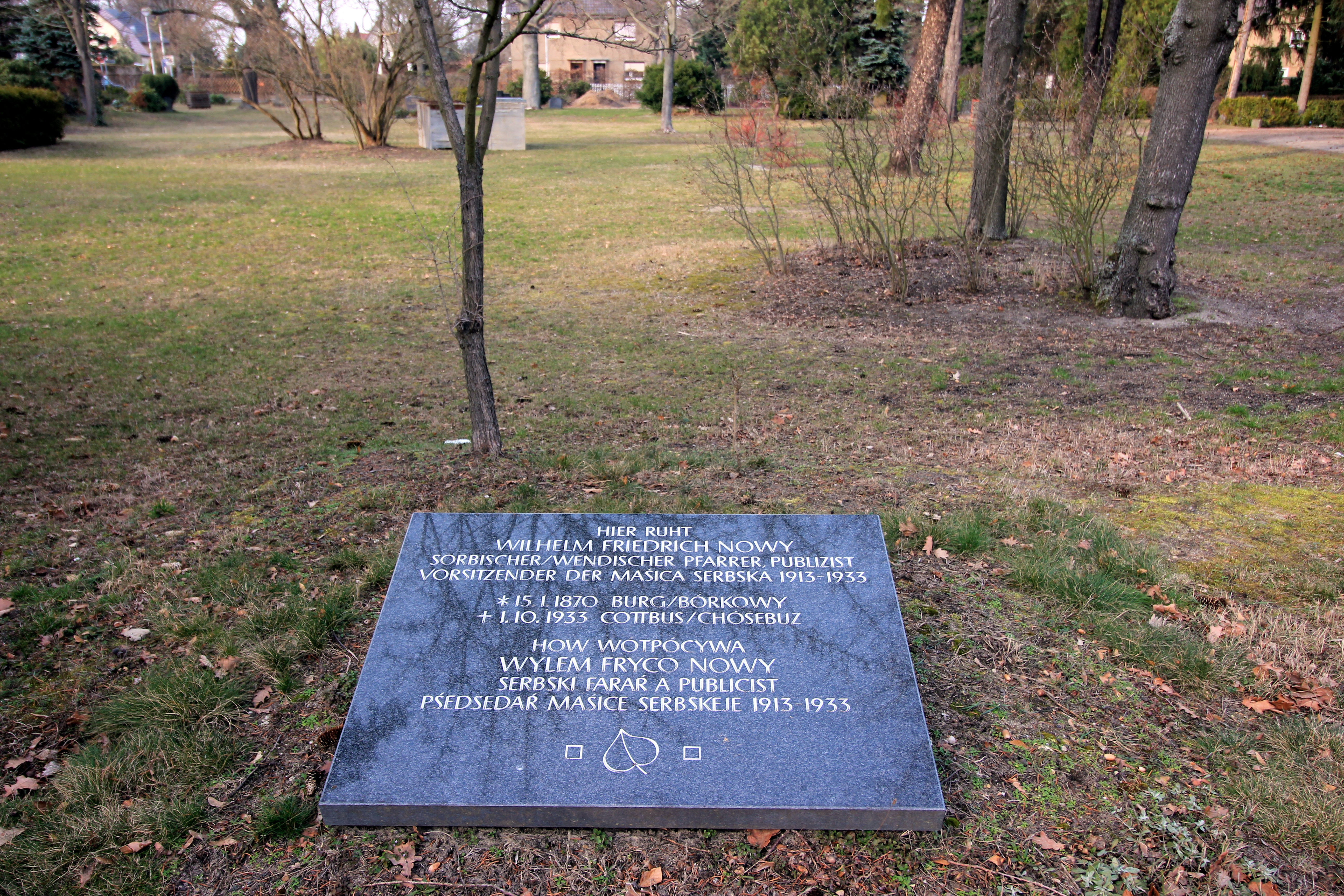 Hornjoserbsce: Row Wylema Noweho na Sewjernym kěrchowje w Choćebuzu. Dolnoserbski: Row Wylema Nowego na Pódpołnocnem kjarchobje w Chóśebuzu.